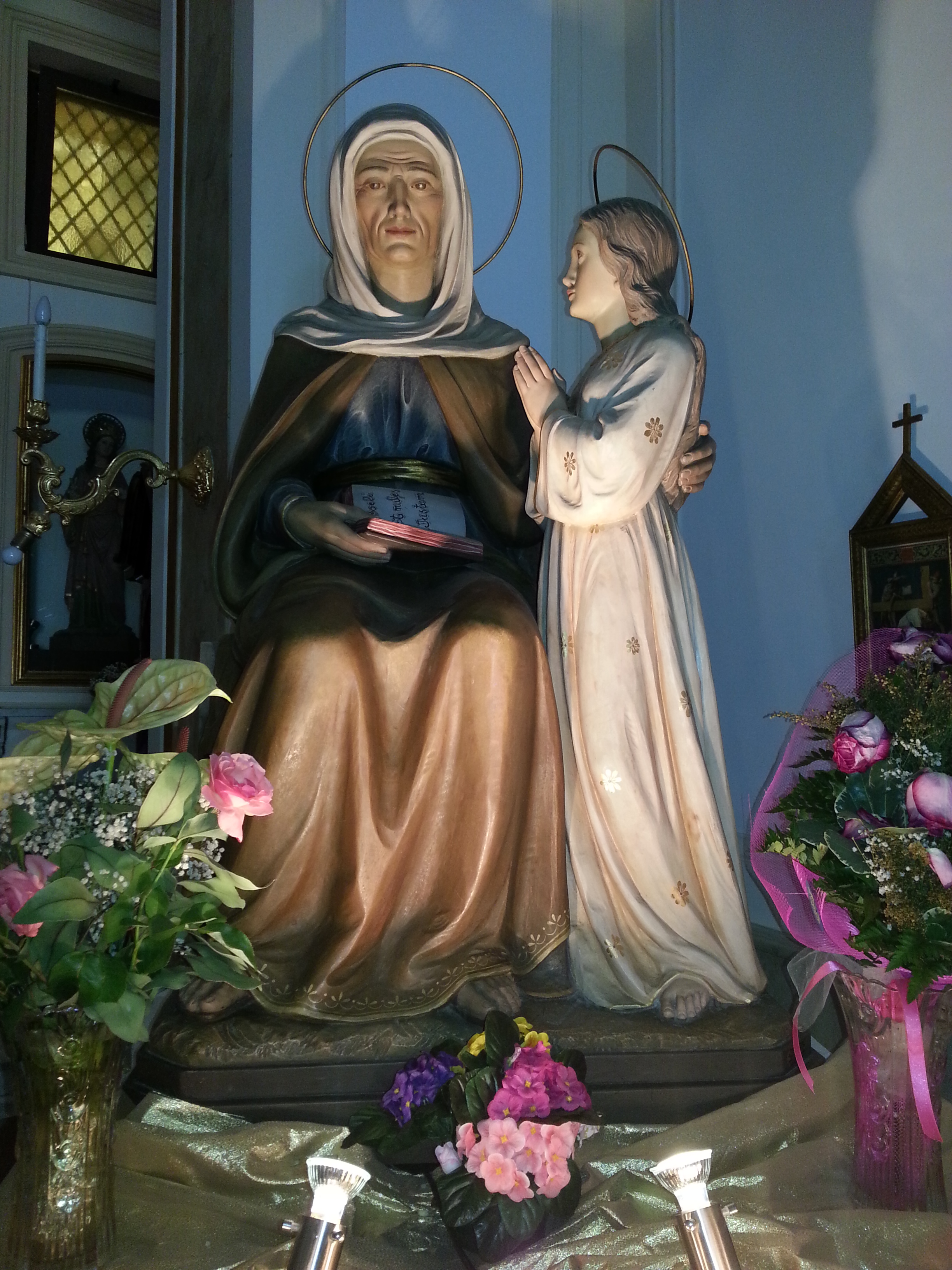 Statua di S. Anna venerata nella chiesa di S. Maria del Rifugio ad Avellino